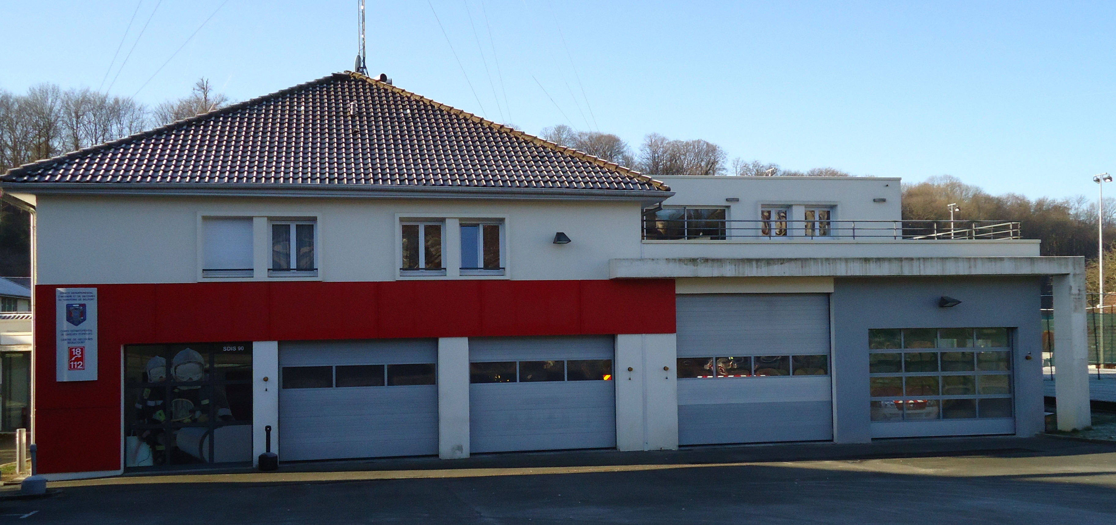 Caserne des Sapeurs-Pompiers de Beaucourt